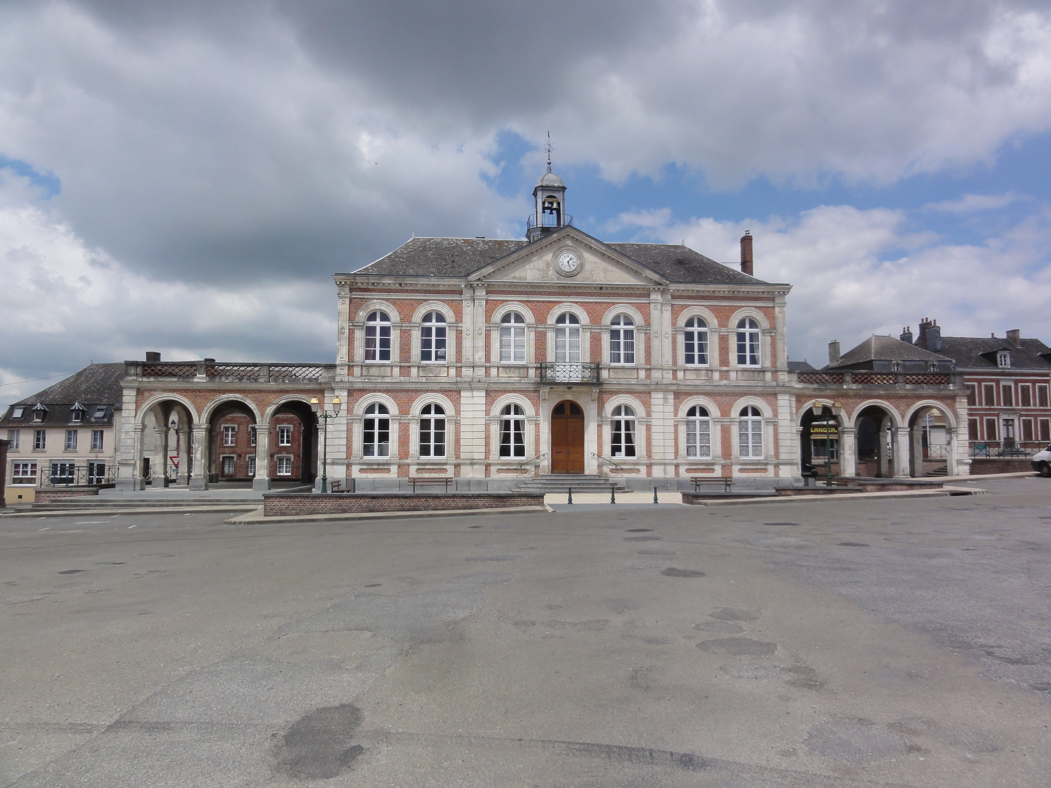 Brunehamel (Aisne) mairie